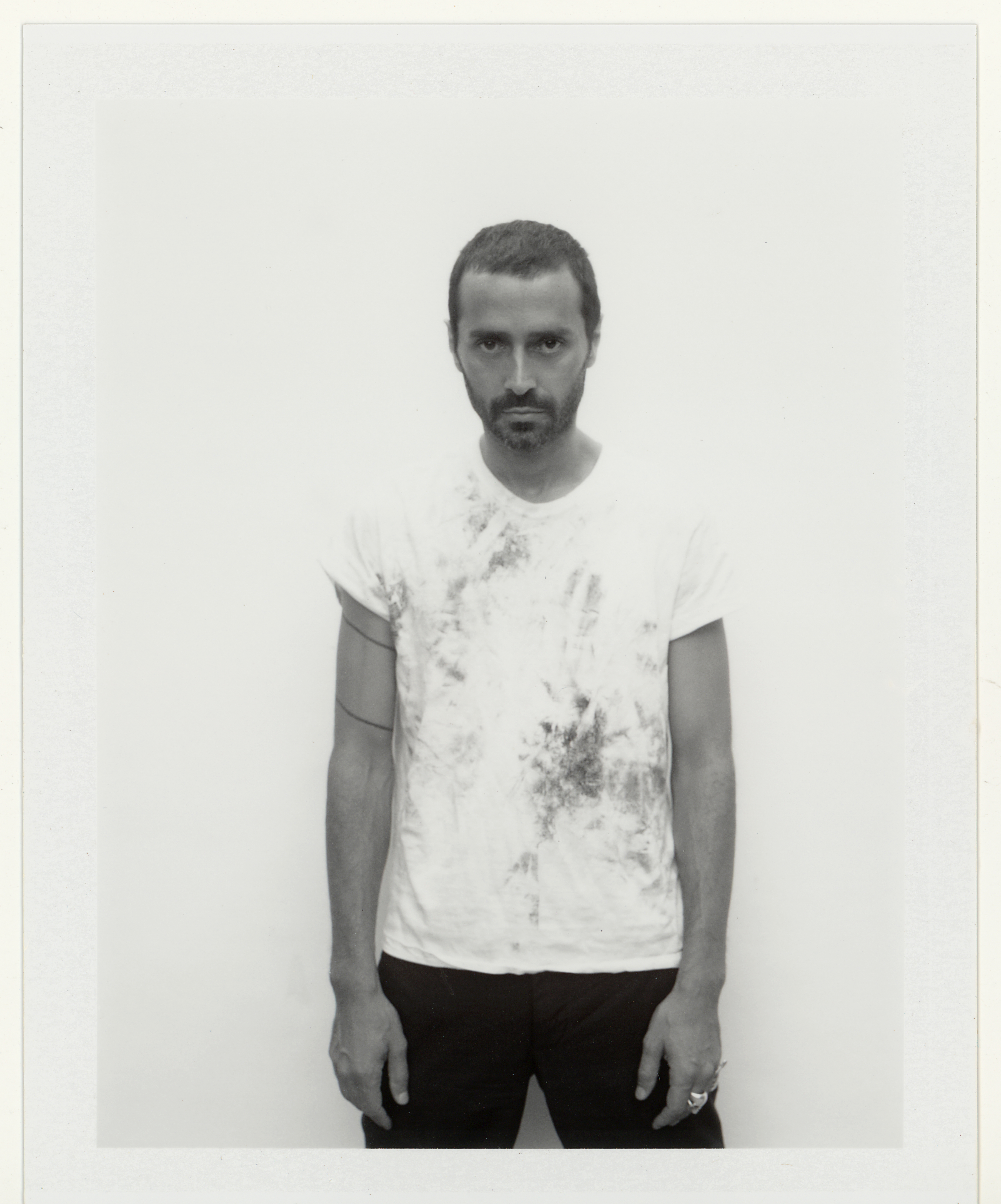 Fabio Novembre